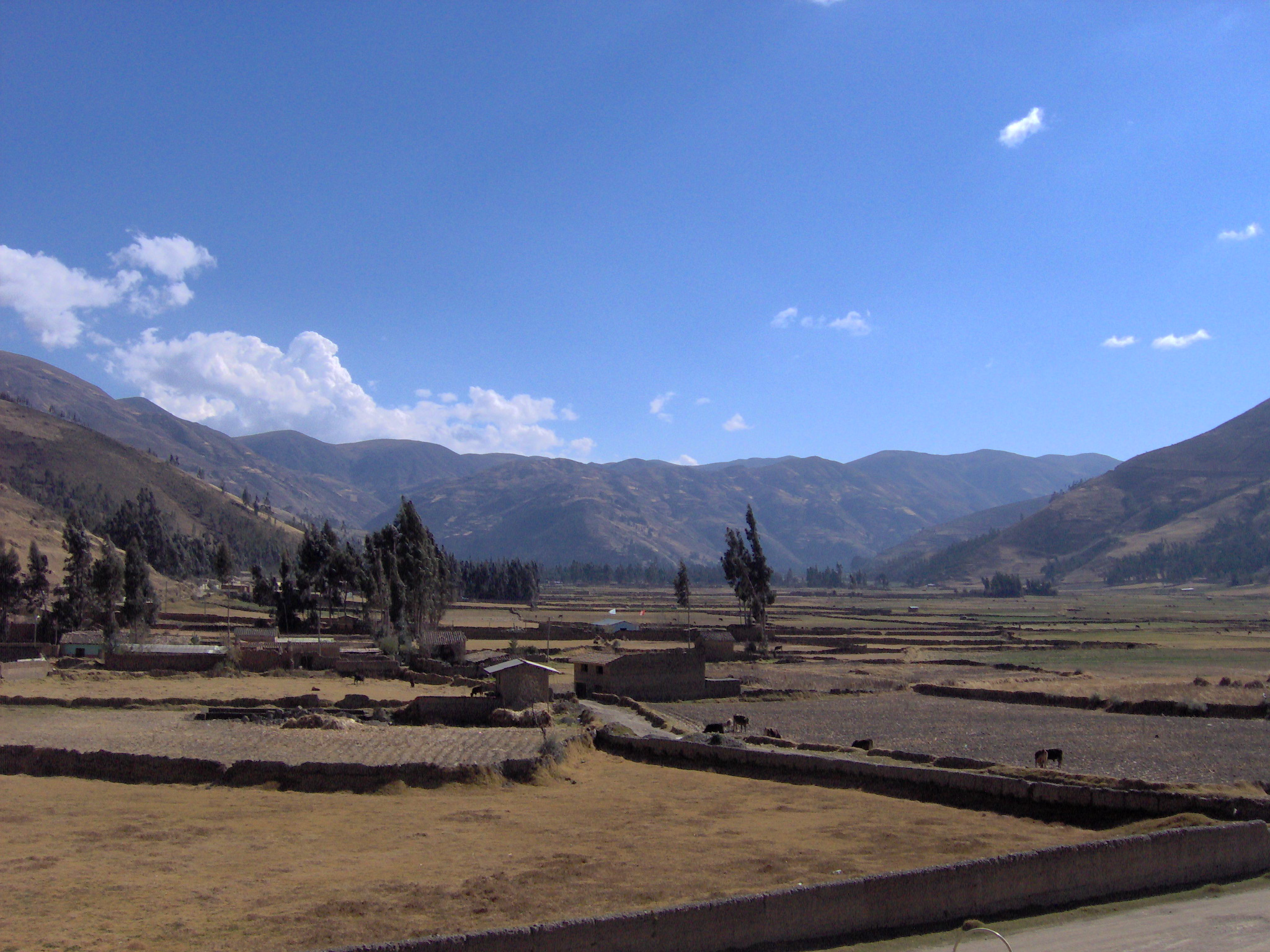 Campos despues de la cosecha, en la ciudad de Pampas-Tayacaja.